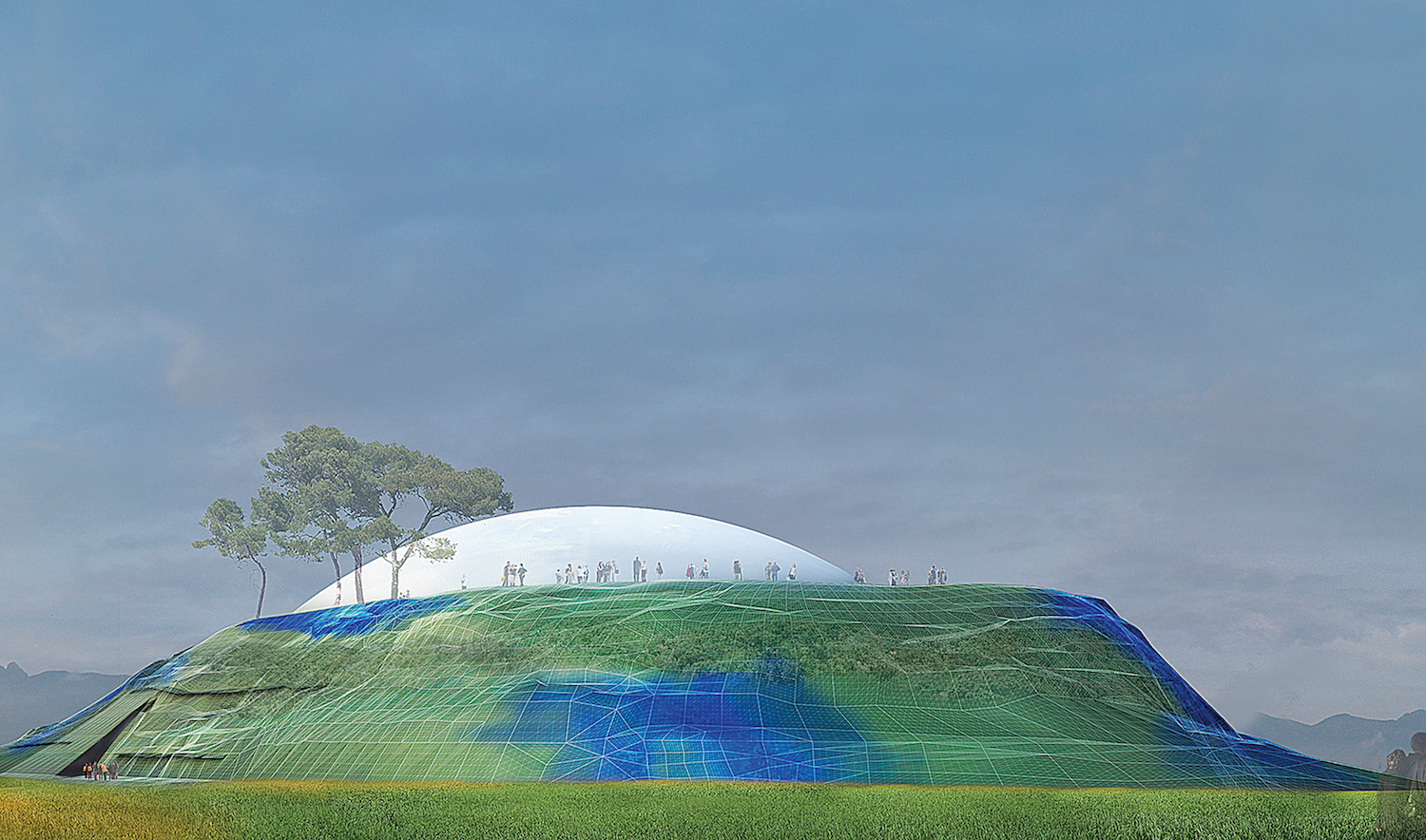 Κέντρο Πληροφόρησης-Βιβλιοθήκη "Στέλιος Ιωάννου"